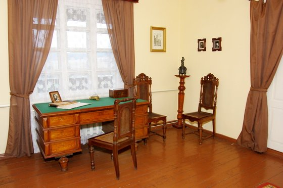 Інтэр'ер у сядзібе Францішка Багушэвіча ў Кушлянах. Фота з сайта Дзяржаўнага музея гісторыі беларускай літаратуры.